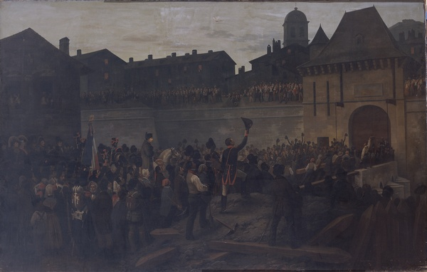 Napoléon venant de l'Ile d'Elbe et arrivant le soir du 7 mars 1815 devant la porte de Bonne de l'enceinte Créqui de la ville de Grenoble. "photographie © Musée de Grenoble". Huile sur toile 260 x 410 cm